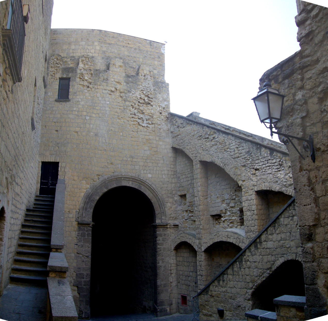 Napoli, Castel dell'Ovo: interno della rampa superiore